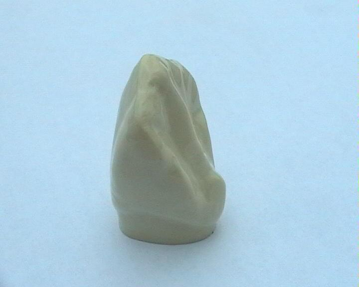 Zahn 23 (linker oberer Eckzahn) von mesial-palatinal (Mittenseite-Gaumenseite) - Gipsmodell für die Zahntechnikerausbildung